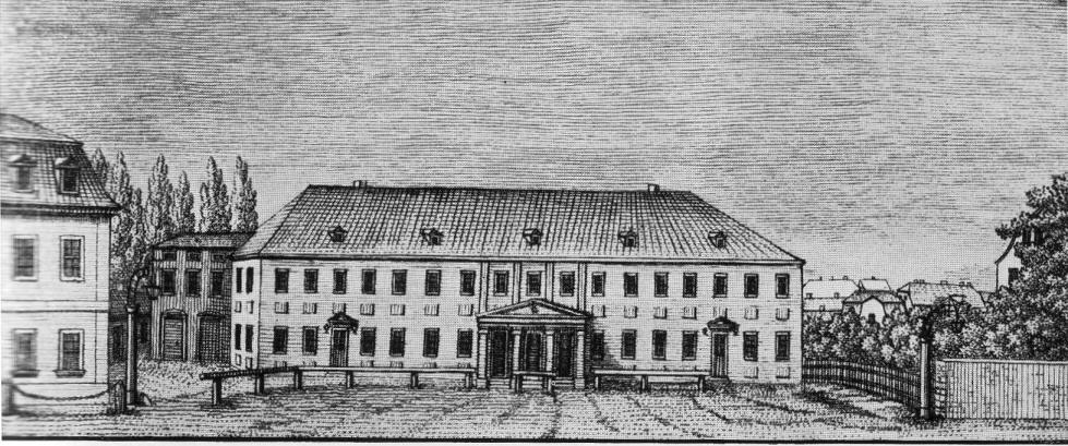 Das Alte Weimarer Hoftheater. Stich um 1800. Das 1779 von dem Hofjäger Hauptmann, einem unternehmungslustigen Bauherrn, mit Unterstützung der Herzogin Anna Amalia gegenüber ihrem Palais errichtete Redouten- und Komödienhaus, das nach der Rückkehr Carl Augusts und Goethes aus der Schweiz am 7. Januar 1780 eröffnet wurde, ist das klassische Theater Weimars. 1798 wurde es unter Goethes Leitung von dem Architekten Thouret durch Umbau den größeren Bedürfnissen der Bühne der Klassiker angepasst und am 12. Oktober 1798 feierlich eröffnet mit Wallensteins Lager. Am 22. März 1825 brannte das ruhmvolle Bühnenhaus ab.